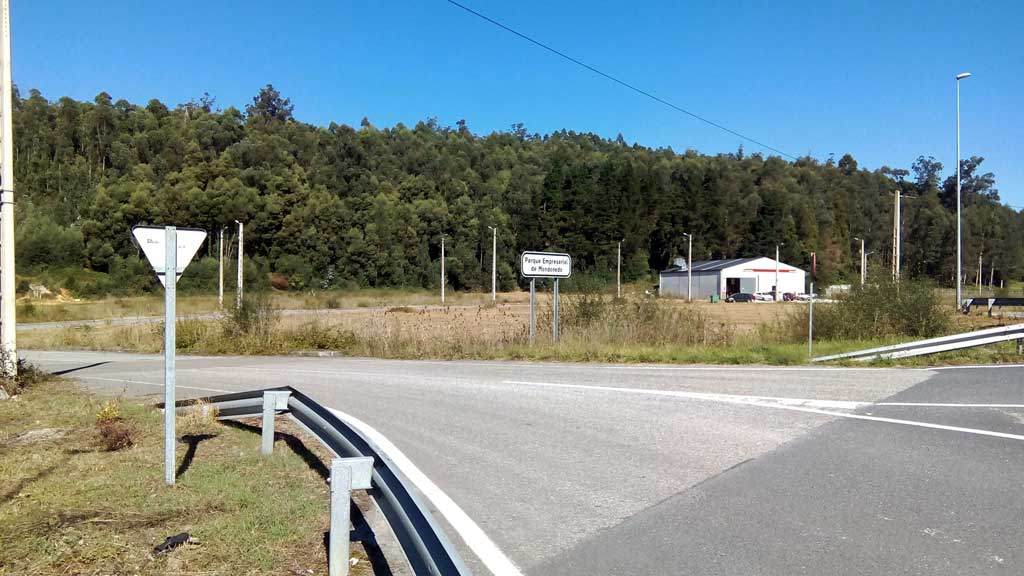 Acceso ao Parque Empresarial de Mondoñedo, Lugo.